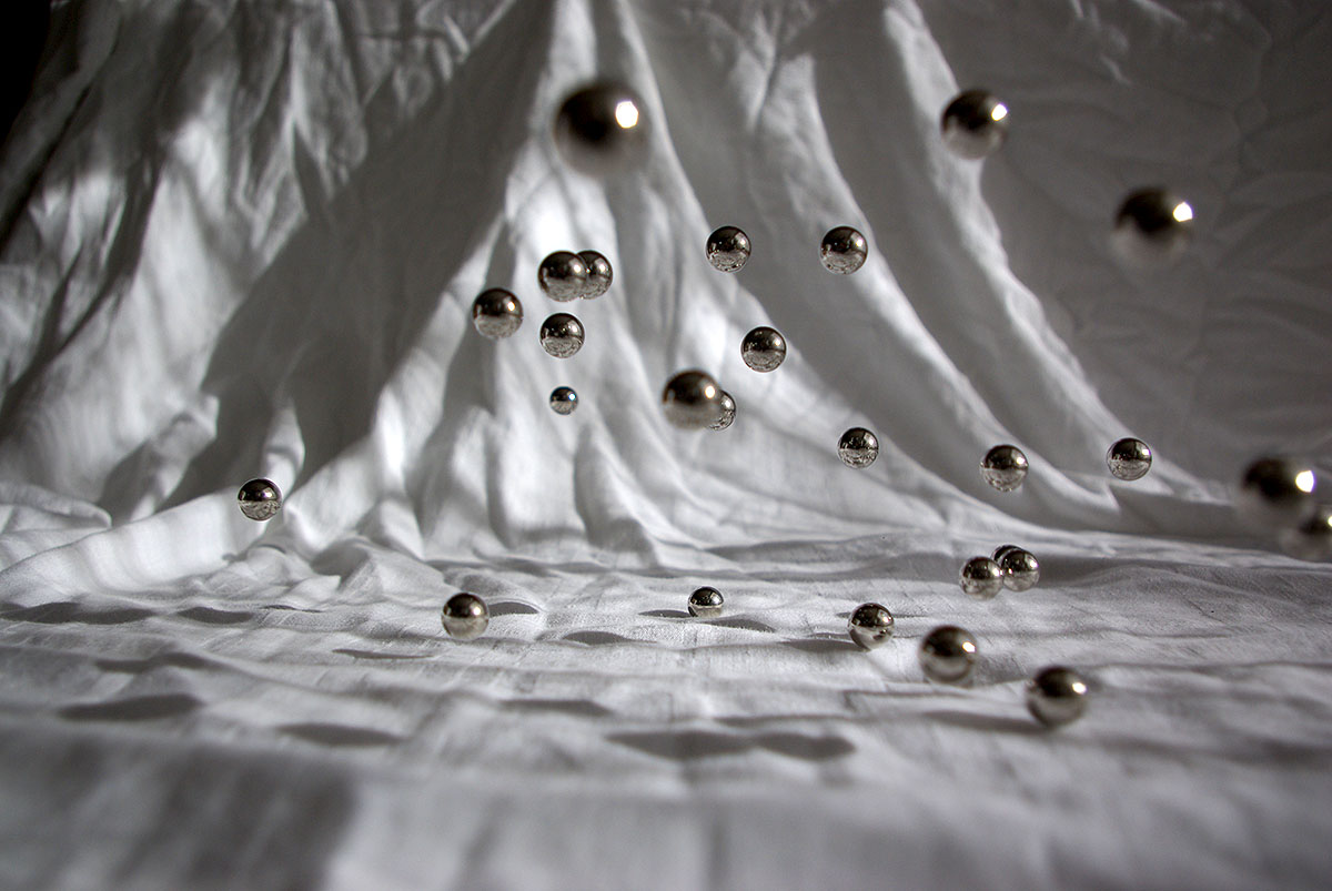 Kugeln, die herunterfallen. Belichtungszeit: 1/2000 Sekunde.